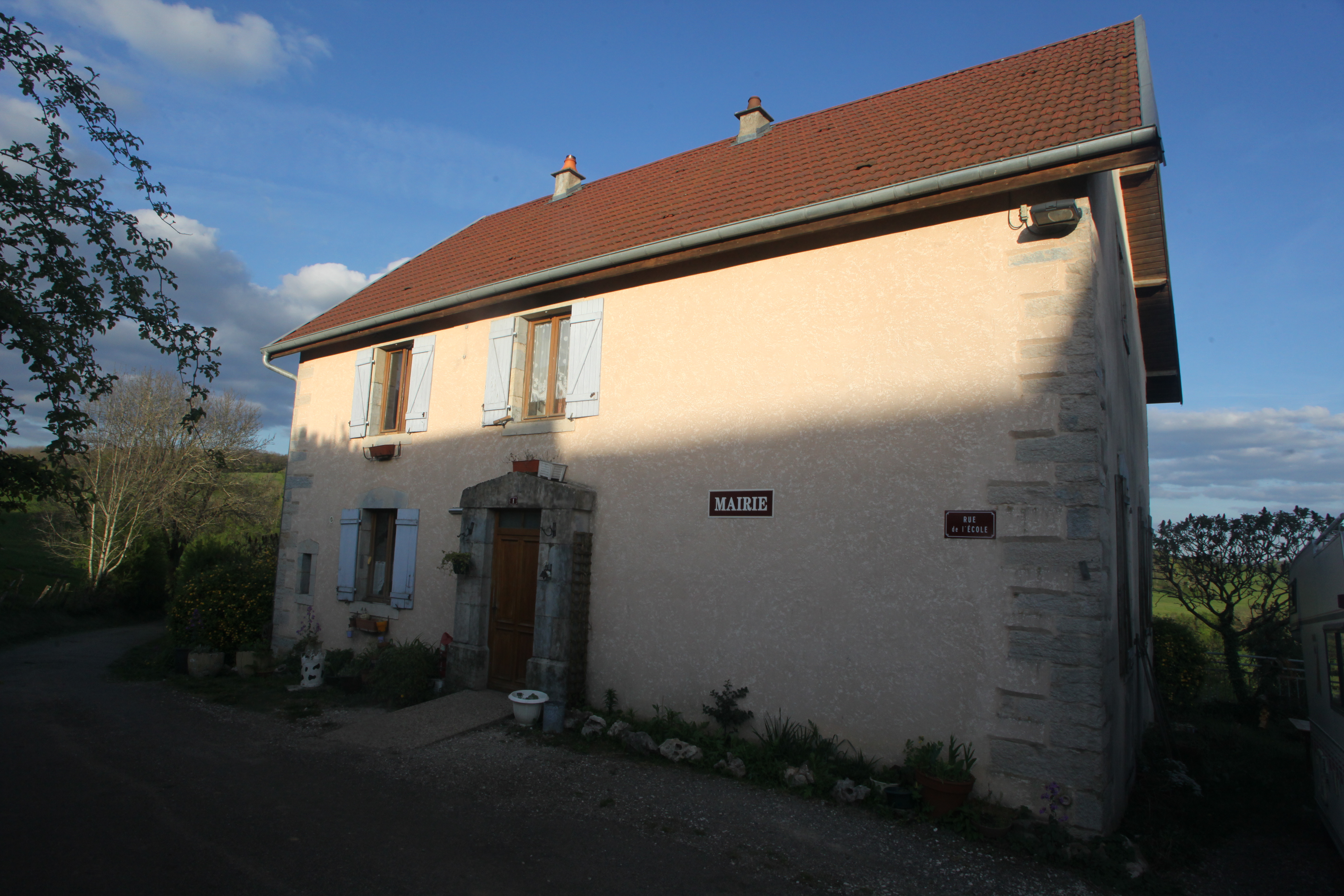 Mairie de By (Doubs).